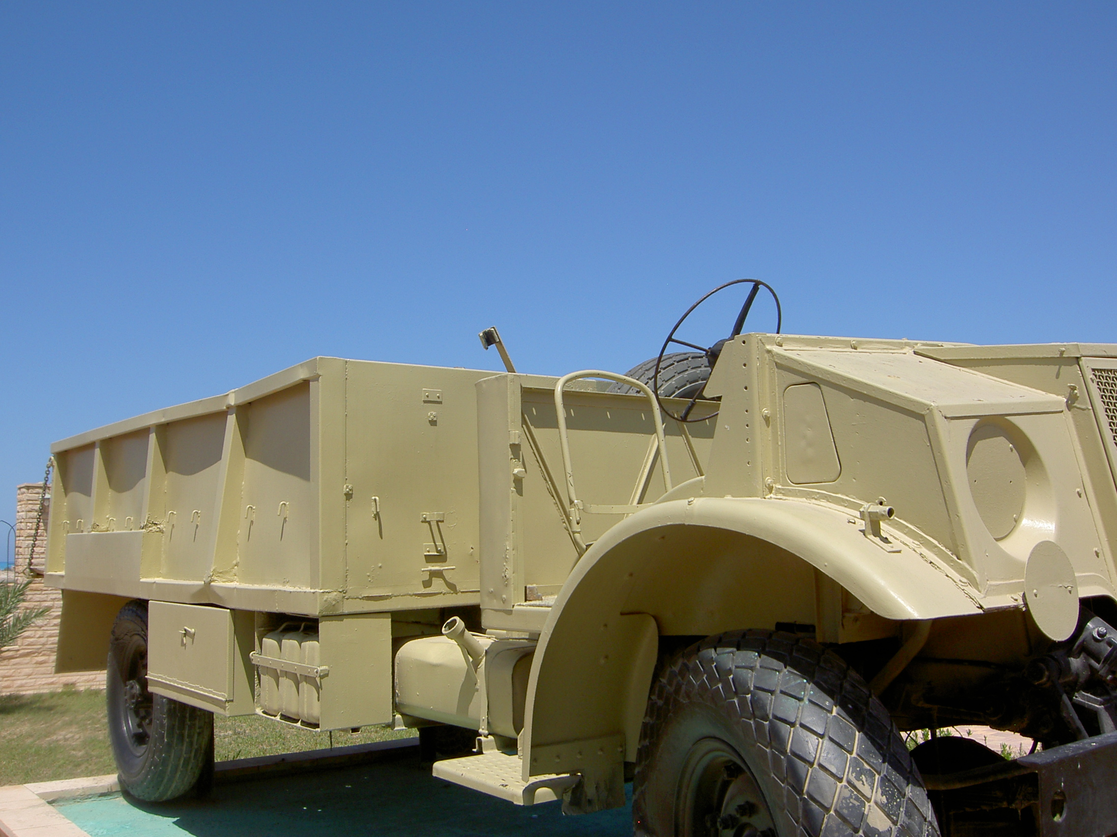 Camion Ford F60 L CMP della II guerra mondiale esposto al museo della Battaglia di El Alamein (Egitto), in forza all'LRDG (circa 1940)